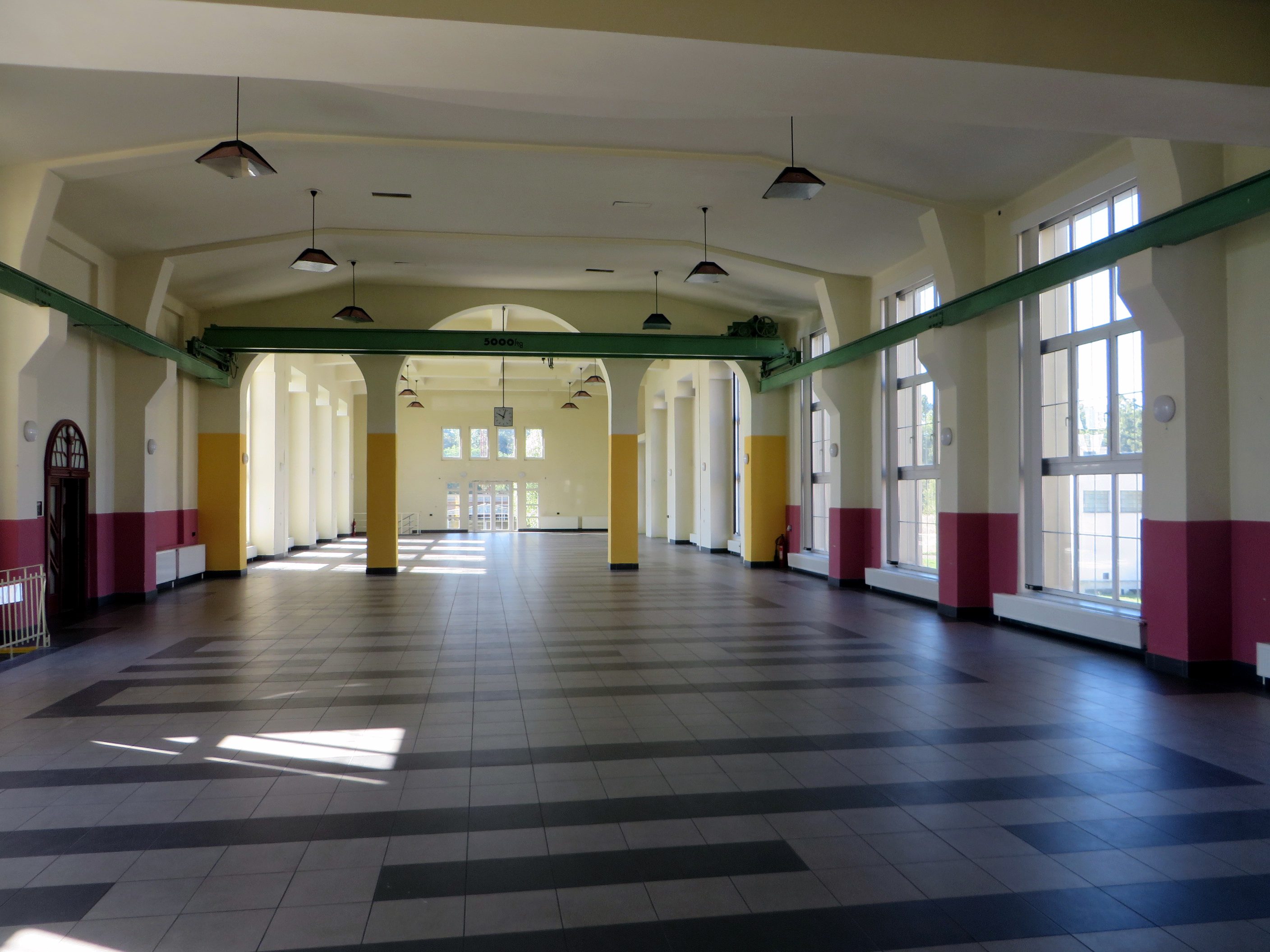 Radiostanice v Poděbradech – někdejší hala pro technologii.